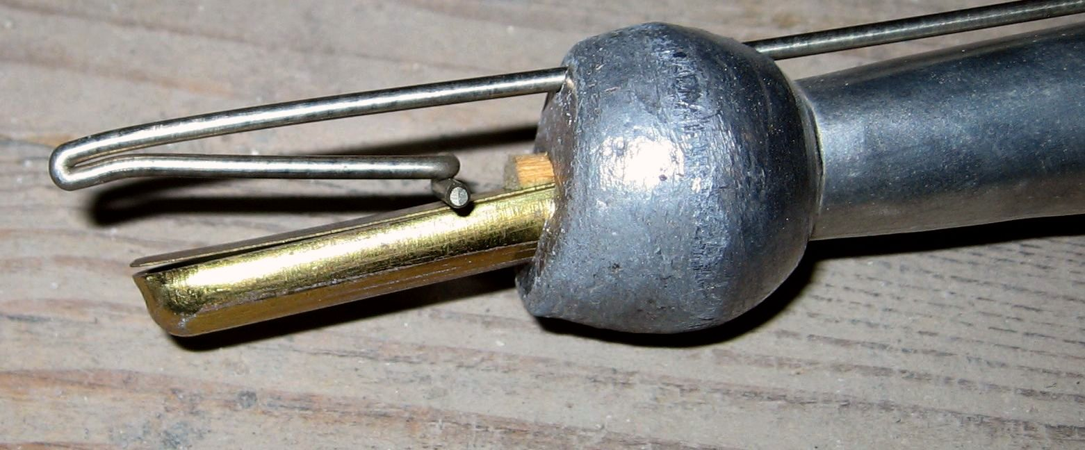 détail d'une anche de clairon